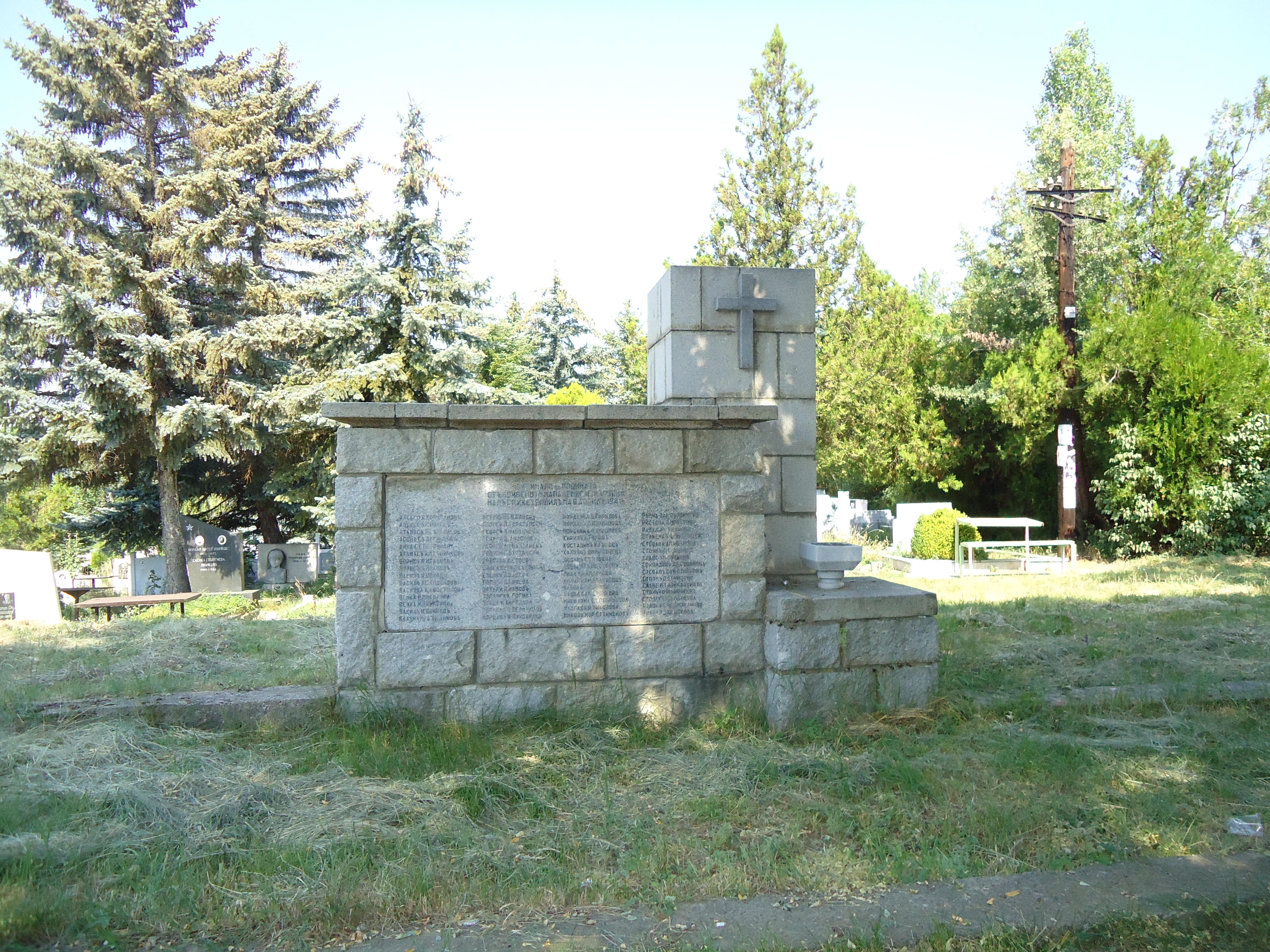 Братска могила на загиналите по време на бомбардировката на Кюстендил на 6 април 1941 г. от югославските ВВС по време на Втората световна война